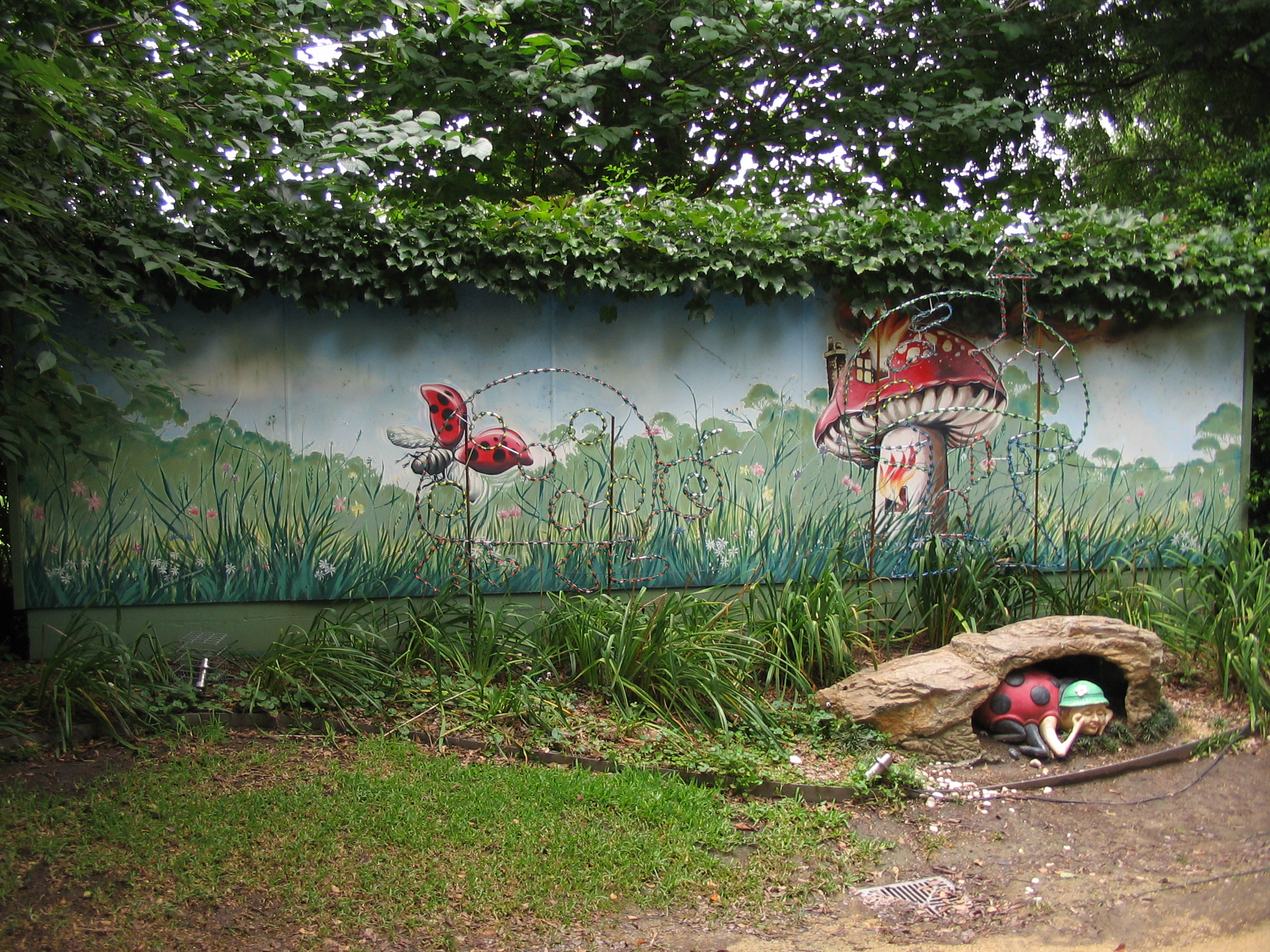 09. Ladybug, Ladybug